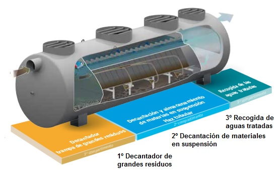 Funcionamiento de un decantador de tratamiento de aguas